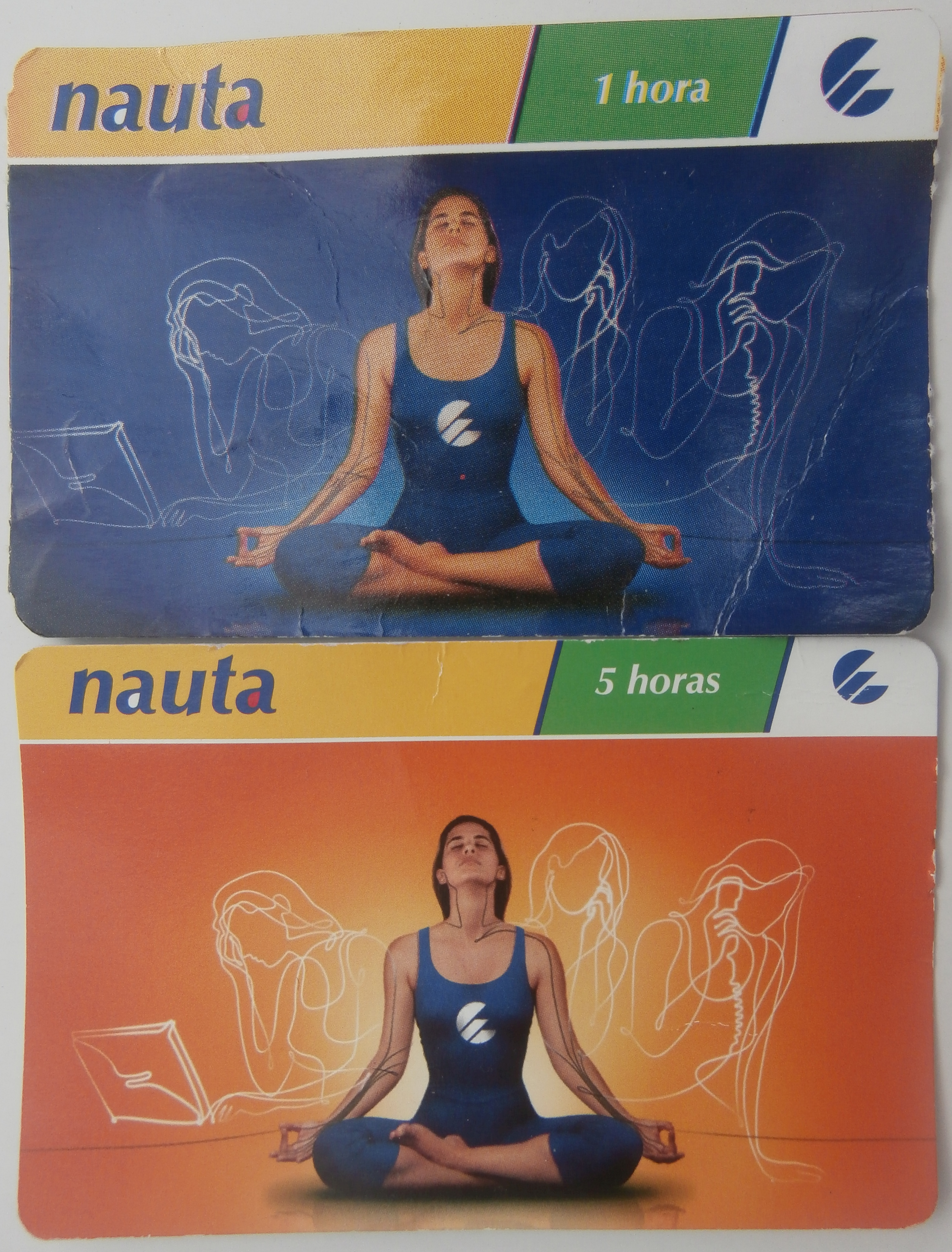 ETECSA: 2 tarjetas de navegación